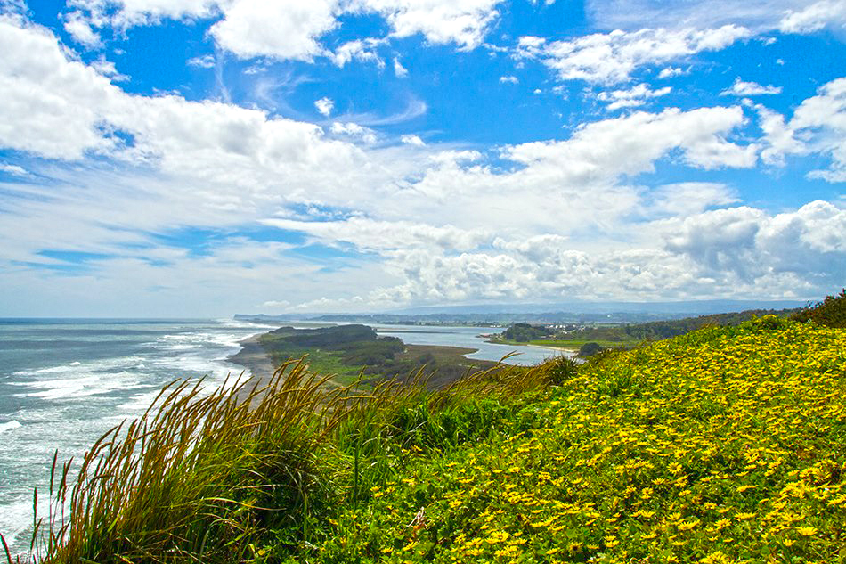 Vista panorámica cerro Maule